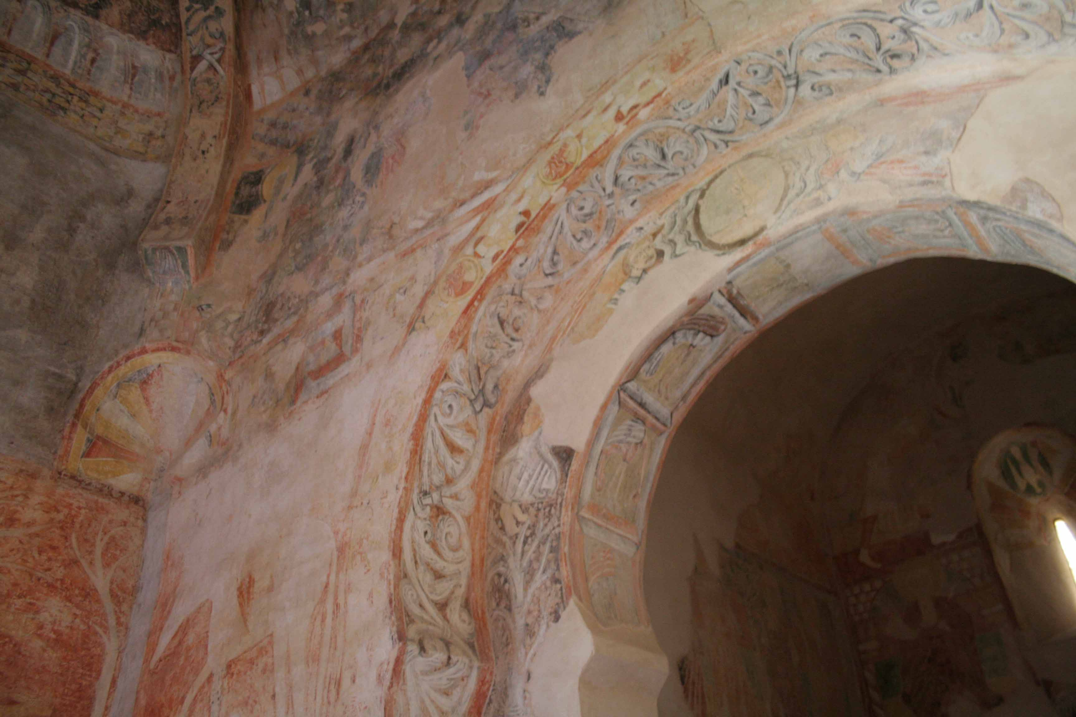 Pinturas encima del arco de herradura del ábside. San Baudelio de Berlanga, Caltojar, Soria, España